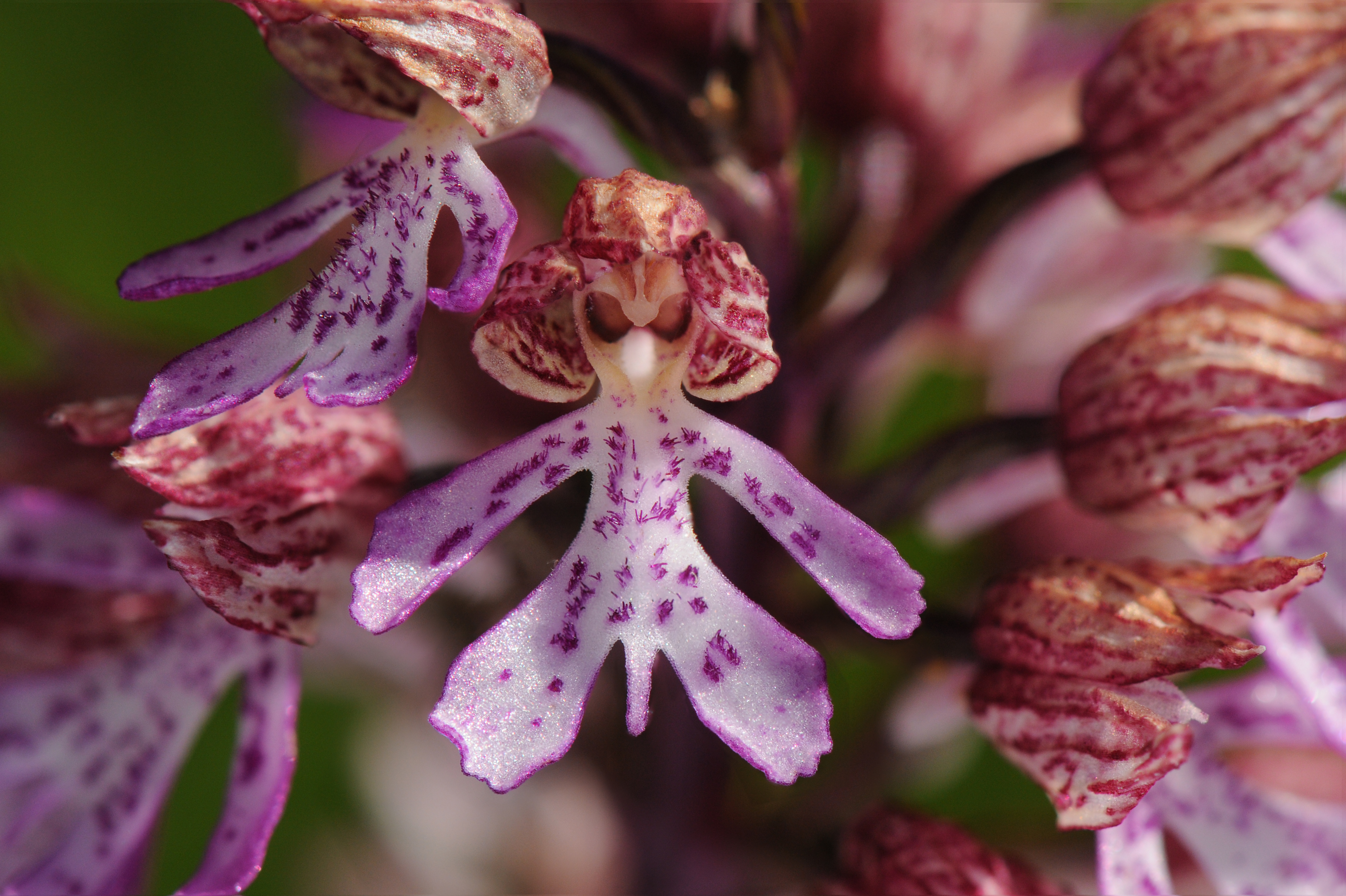 Orchis × hybrida (Orchis militaris × Orchis purpurea)